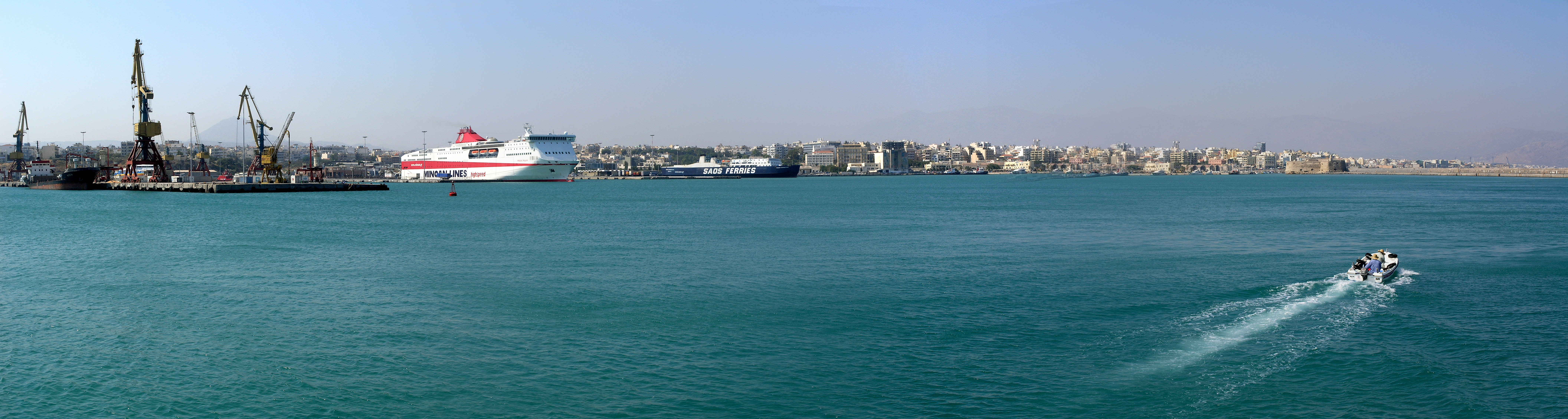 Греция, остров Крит, панорама порта Ираклиона